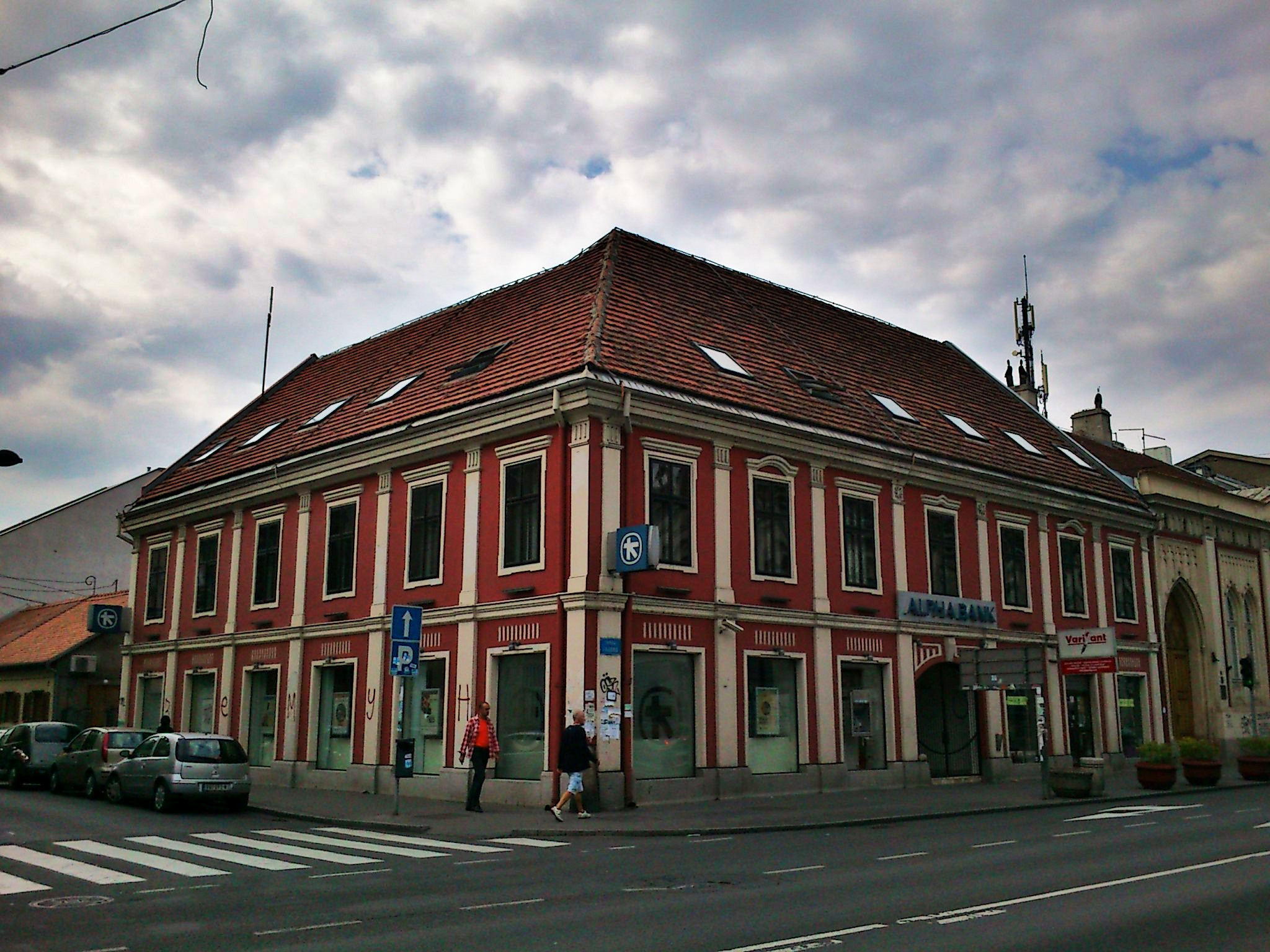 Кућа у Ул.Главној 7